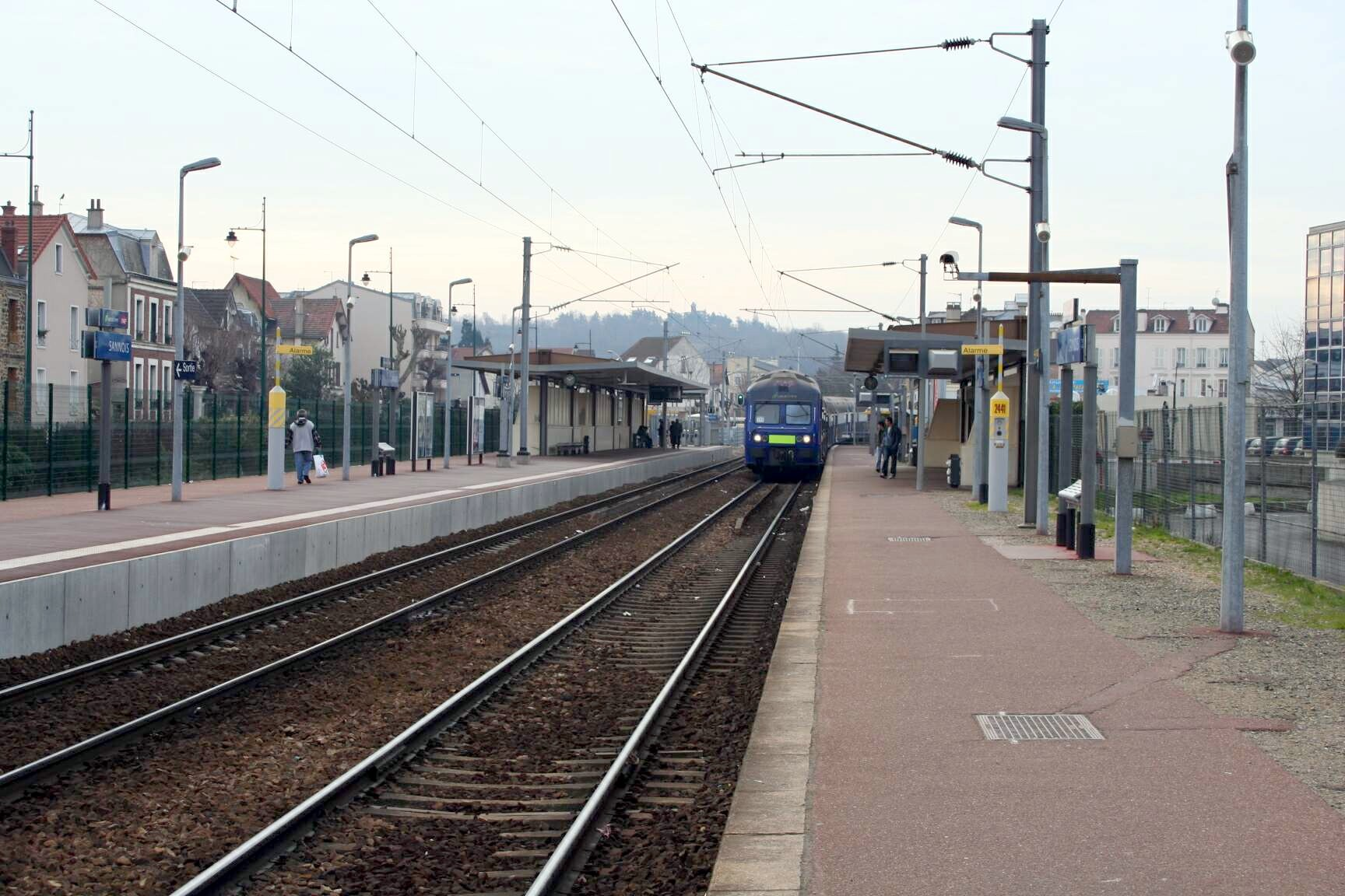 Gare de Sannois - Val-d'Oise (France)